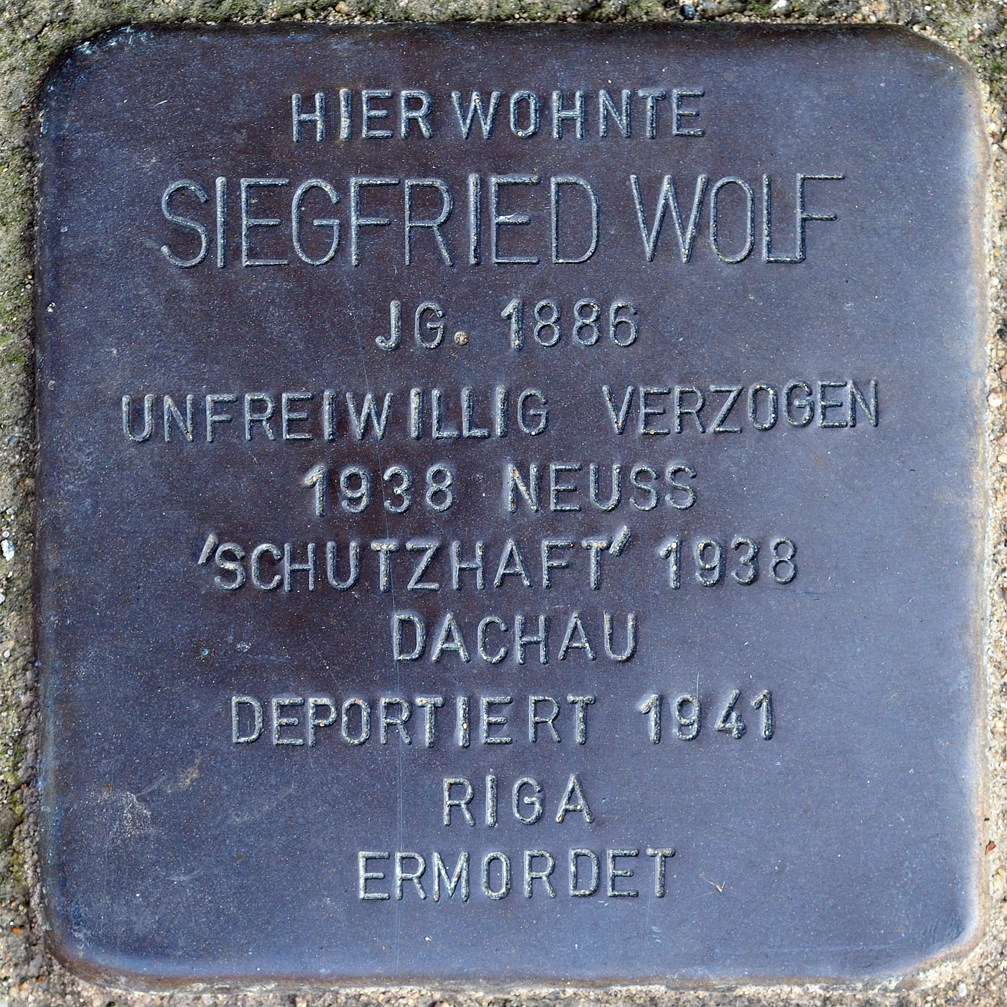 Stolpersteine GV: Wolf, Siegfried